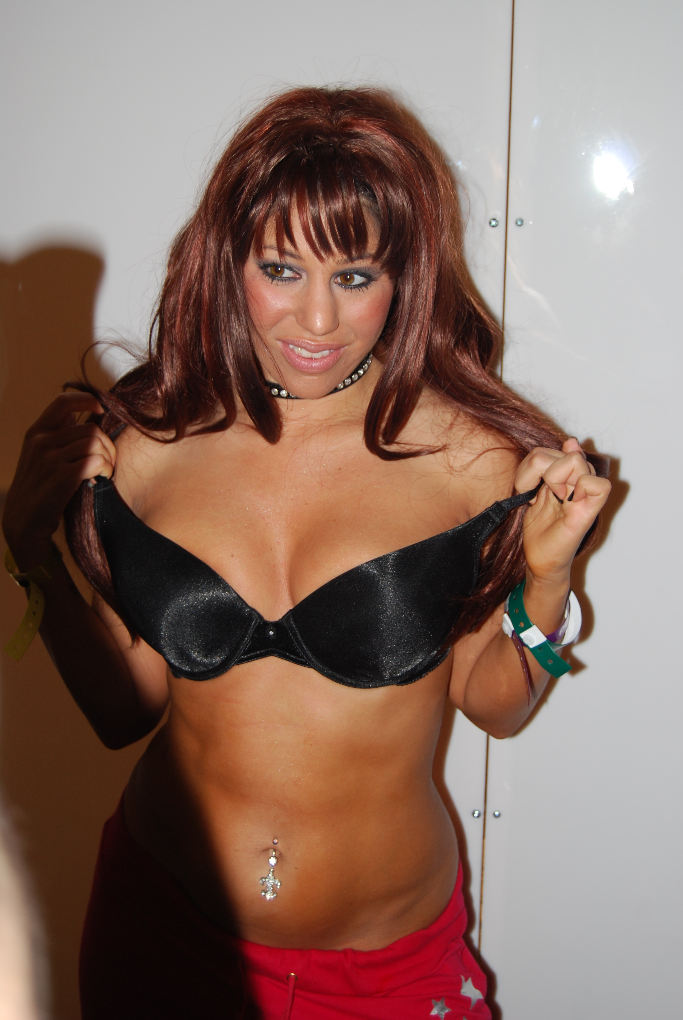 AEE2008_Nikon_Day2 351